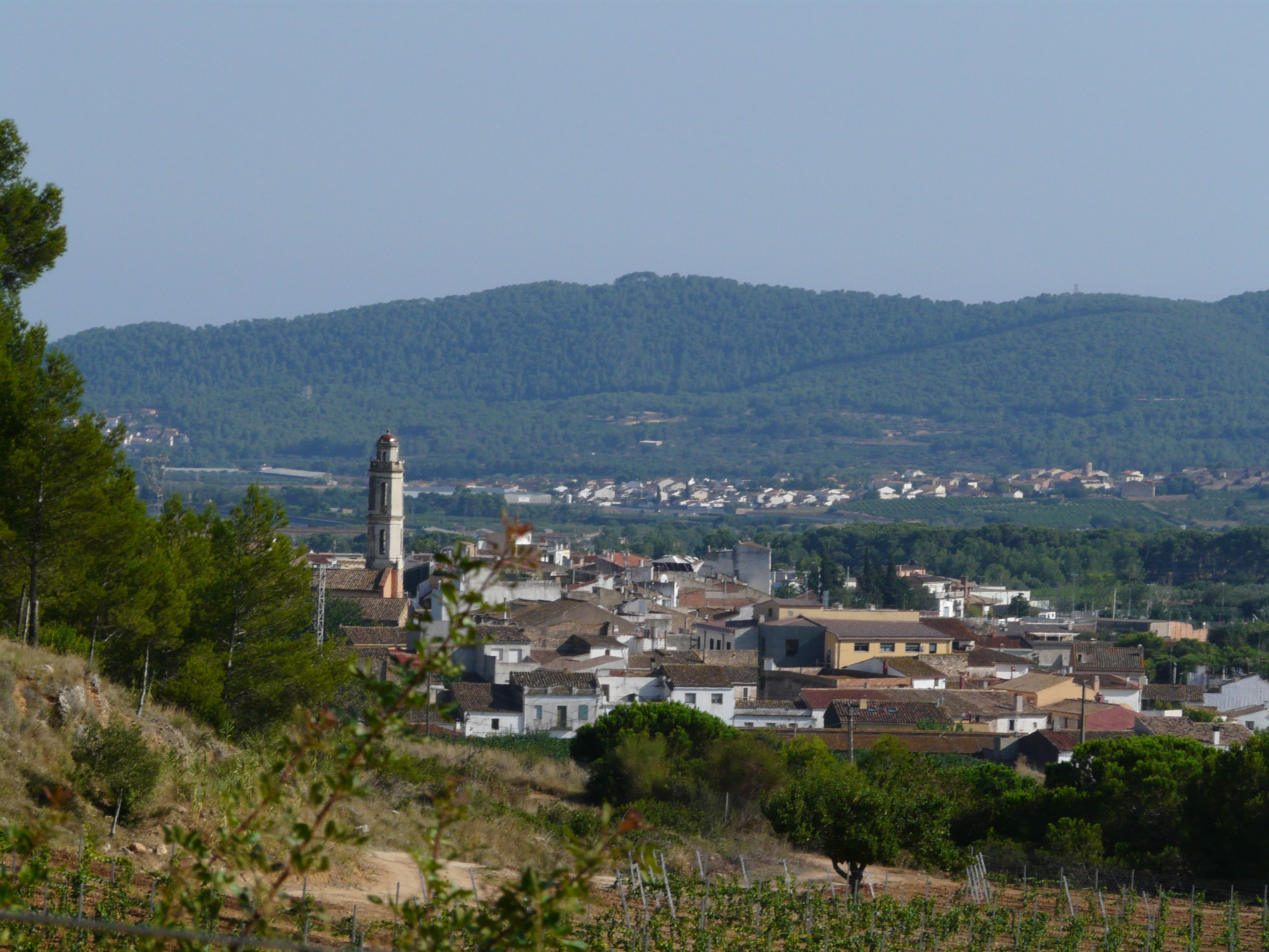 Església parroquial de Santa Maria. C. Major (La Bisbal del Penedès). Object location41° 16′ 51.71″ N, 1° 29′ 16.76″ E